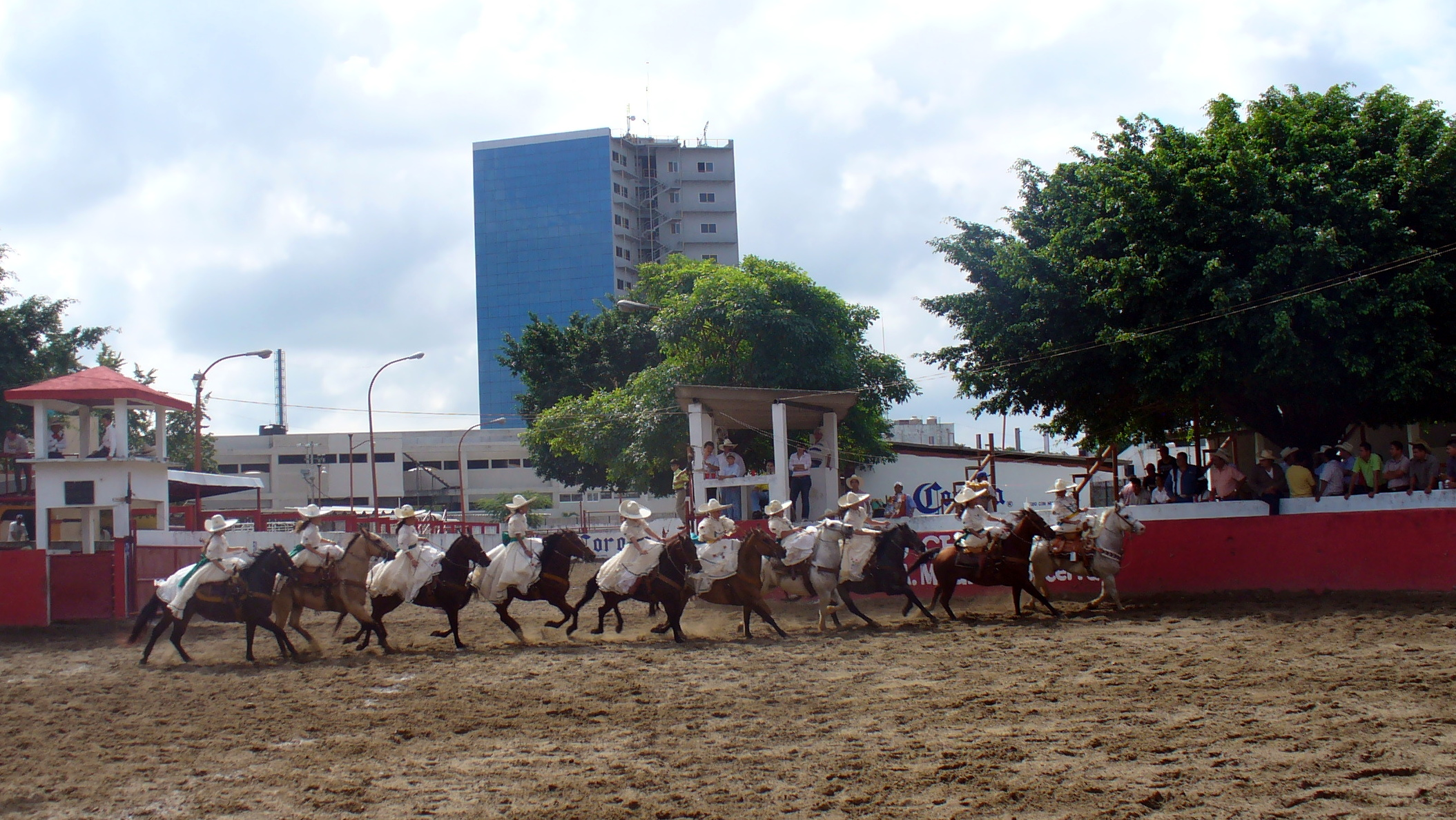 Escaramuza charra iniciando el abanico